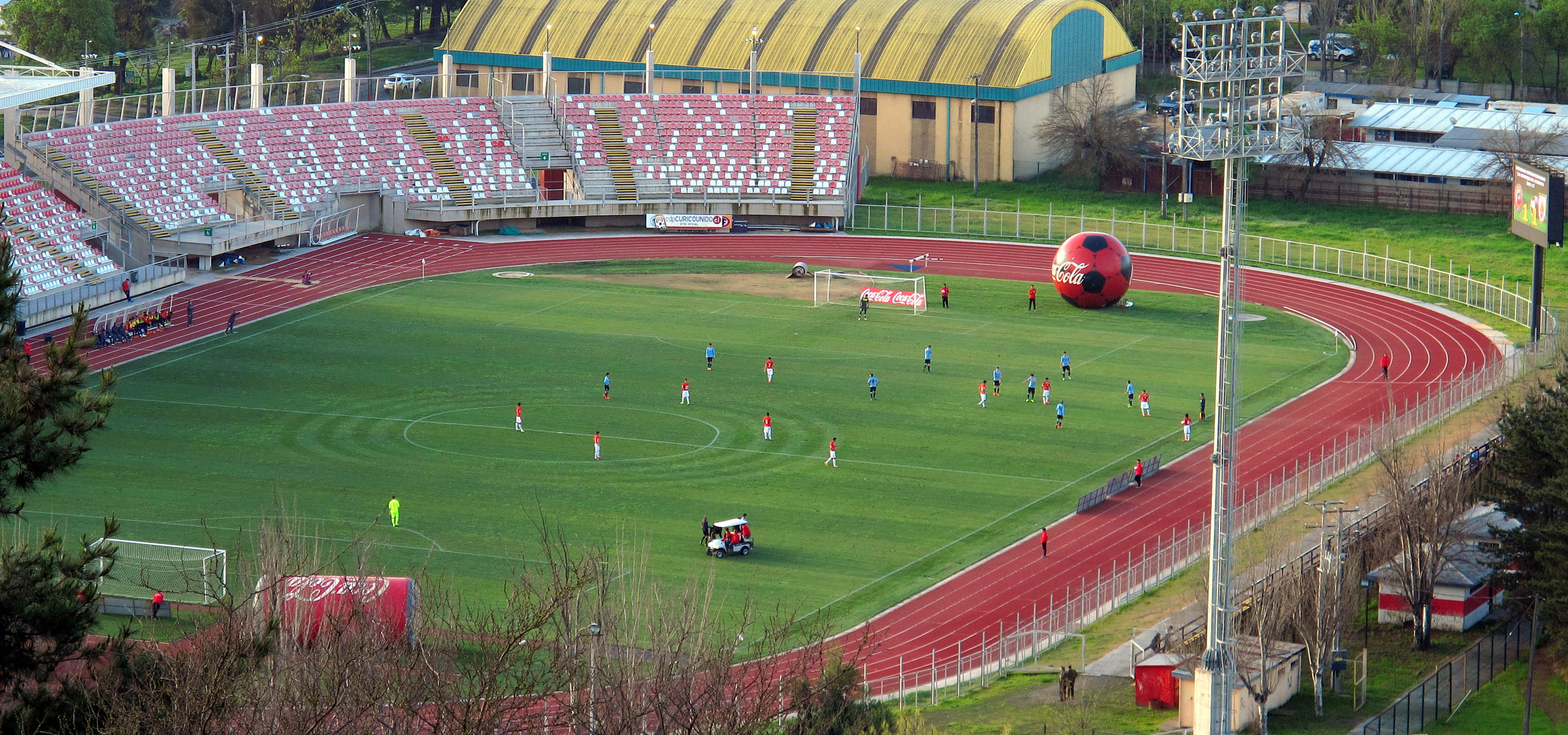 Chile vs Uruguay, estadio La Granja